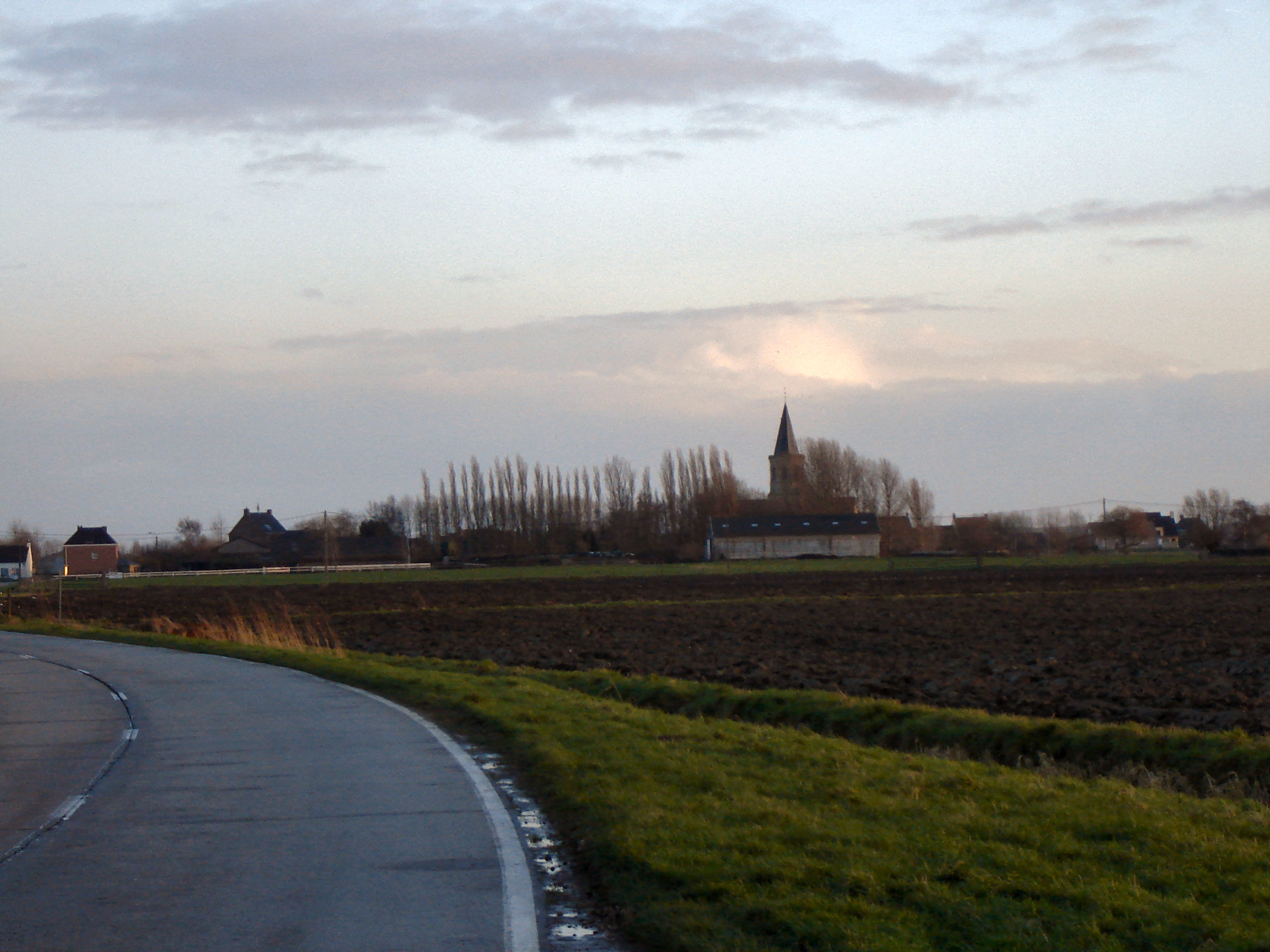 Village of Zande in Koekelare, West Flanders, Belgium